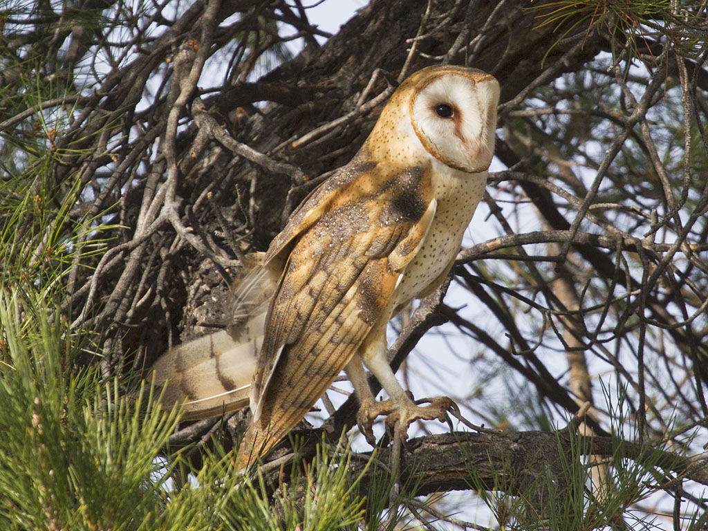 Barn Owl Tyto furcata pratincola. Carrizo Plain National Monument, San Luis Obispo Co., CA, USA.